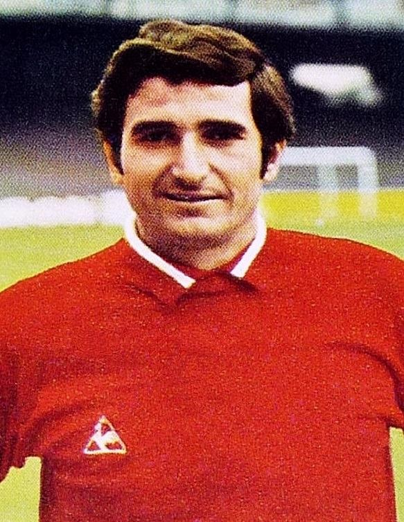 Georges Carnus en 1970, 'Ageducatifs Football 1970 - 1971', Panini figurina n°230.